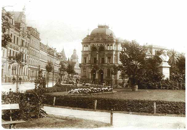 Bamberg, Friedrichstraße 2 / Schützenstraße 1, zwischen 1893 und 1909Friedrichstraße 2; Schützenstraße 1 / Friedrichstr. . Wohn- und Bürohaus, in Ecklage, aufwendigerzweigeschossiger, an den Ecken dreigeschossiger Baublock über hohem Sockel, dieabgeschrägte Eckfront durch Seitentürme mit Kuppeldächern und gerahmte Risalite mitDoppelarkadenlauben betont, Sandsteinquaderbau mit Mansarddach, dem Style Louis XIII.nachempfunden, 1891/92 nach Plänen von Friedrich Geb, ausgeführt von Georg II.Hofbauer, geringe Überformungen im 20. Jh.This is a photograph of an architectural monument.